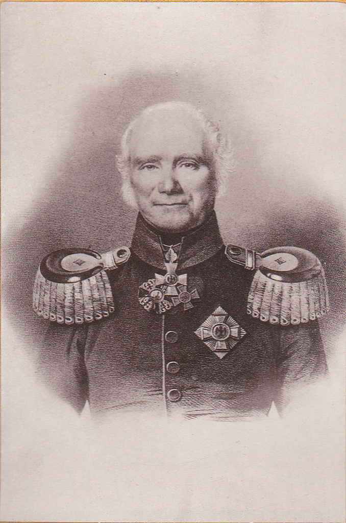 Jacob Bogislaw von Puttkamer (1753–1846), Generalleutnant Datum: vor 1846 Urheber: unbekannter Portaitmaler Quelle: Homepage des Verbandes des Geschlechtes v.Puttkamer e.V. Quell-Link